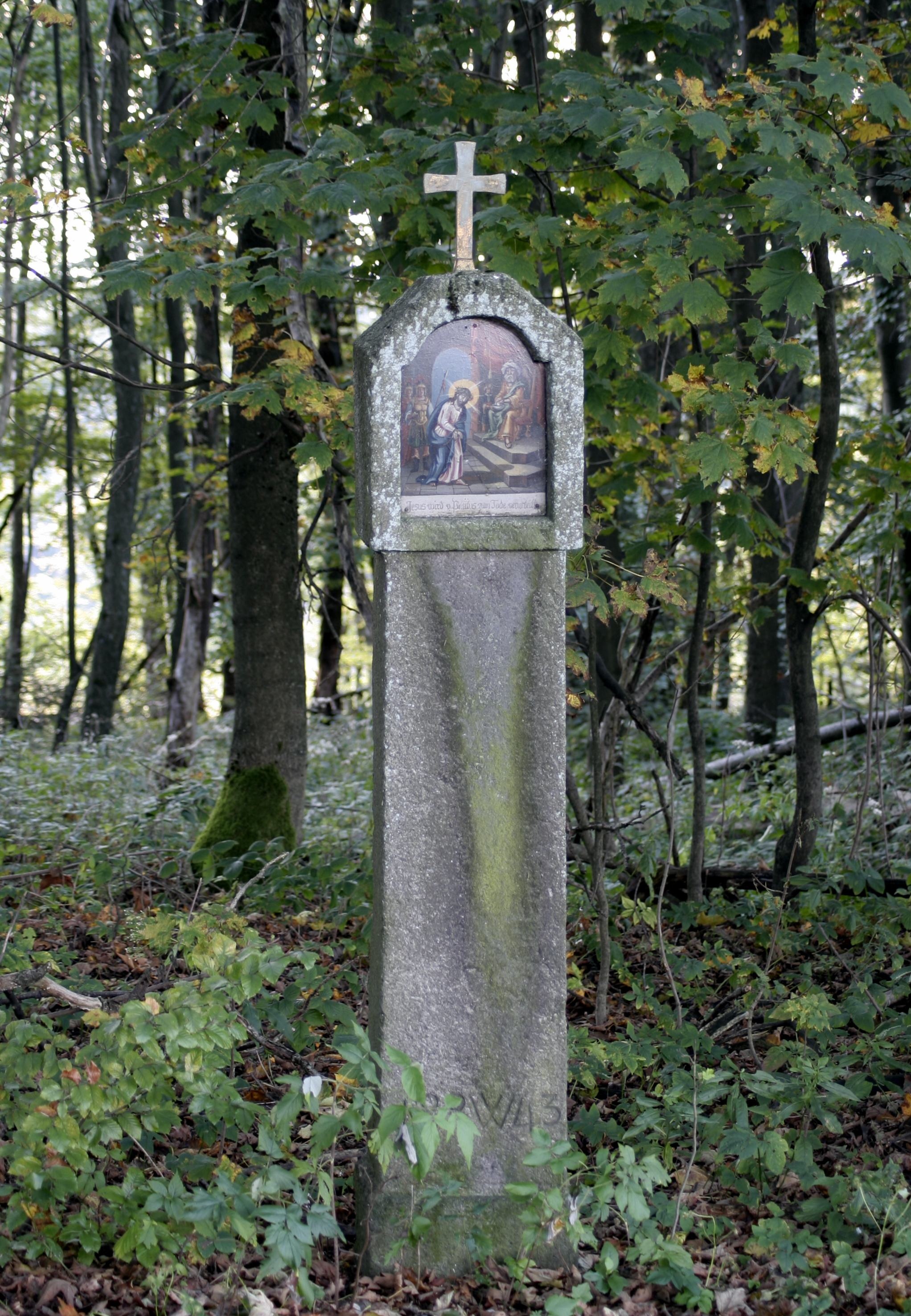 Baudenkmal Deutschland; Bayern; Oberpfalz; Neustadt a.d.Waldnaab, Waldthurn D-3-74-165-33 Oberfahrenberg Kreuzweg, 14 rechteckige Granitpfeiler mit Aufsatz und rundbogiger Bildnische, bez. 1843, Bildtafeln erneuert. (D-3-74-165-33)This is a photograph of an architectural monument.